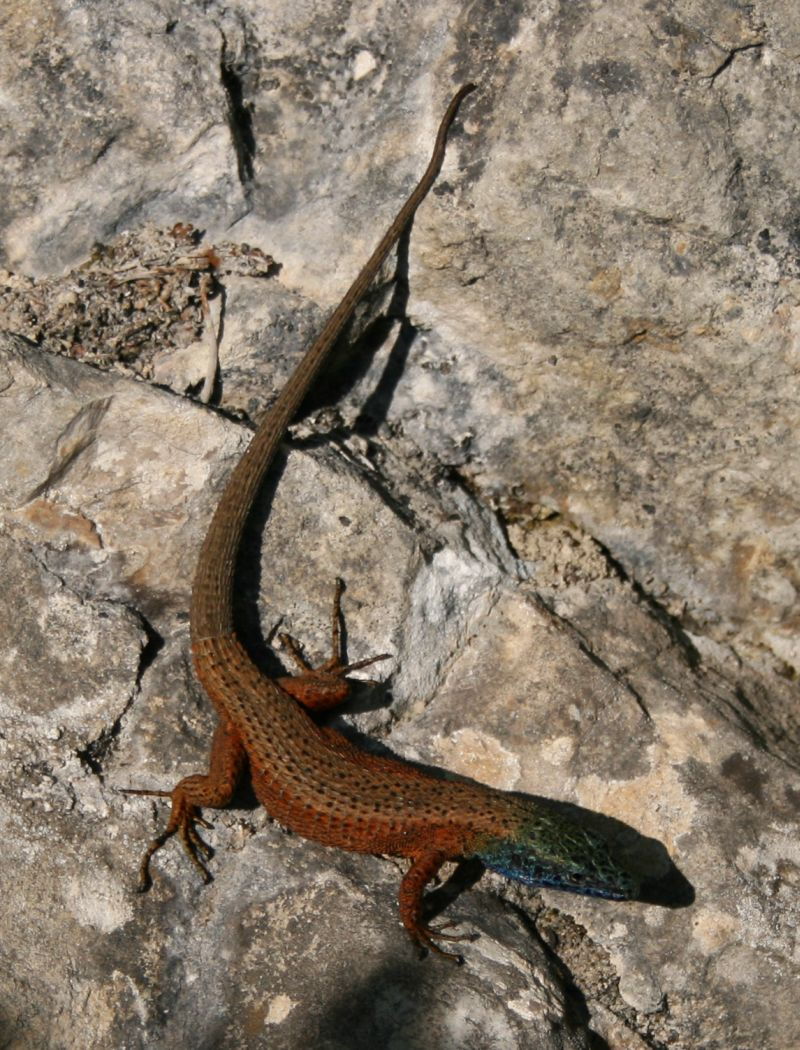 Algyroides nigropunctatus, Eidechsen (Lacertidae) - Italien/Italia/Italy: Friuli-Venezia Giulia, Prov. Trieste, Val Rosandra/Dolina Glinščice